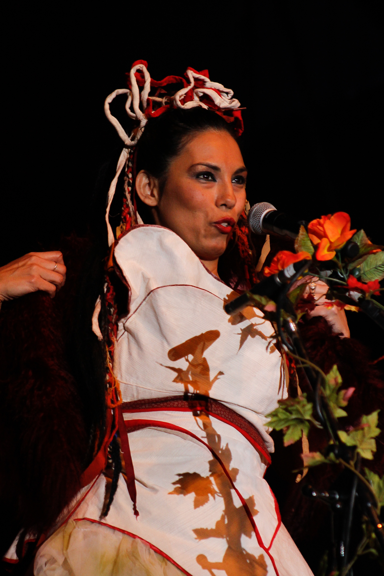 31 de Julio 2011. Tonolec se presentó en Divino Tesoro de el Espacio Joven de Tecnópolis. Fotos: Mariano Sandá/Tecnopolis. En la foto, vocalista Charo Bogarin.